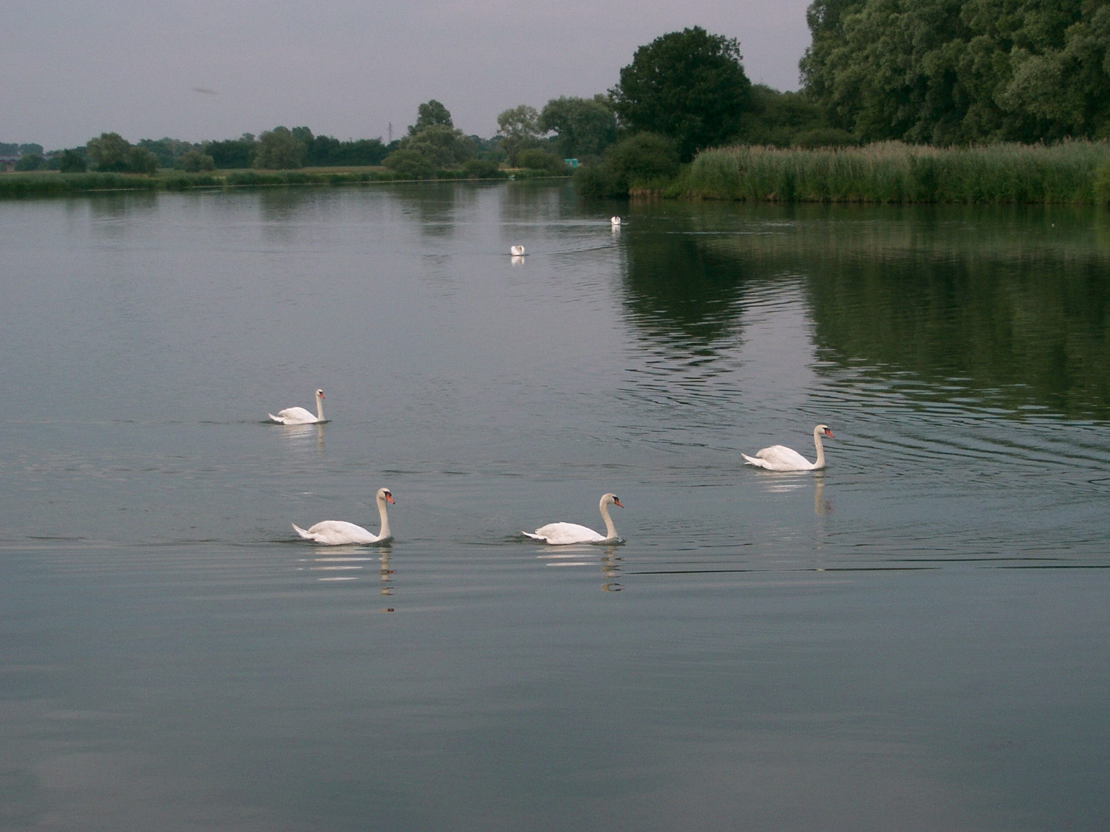 Chivres (France - 21) - la Saône et ses cygnes self made PRA